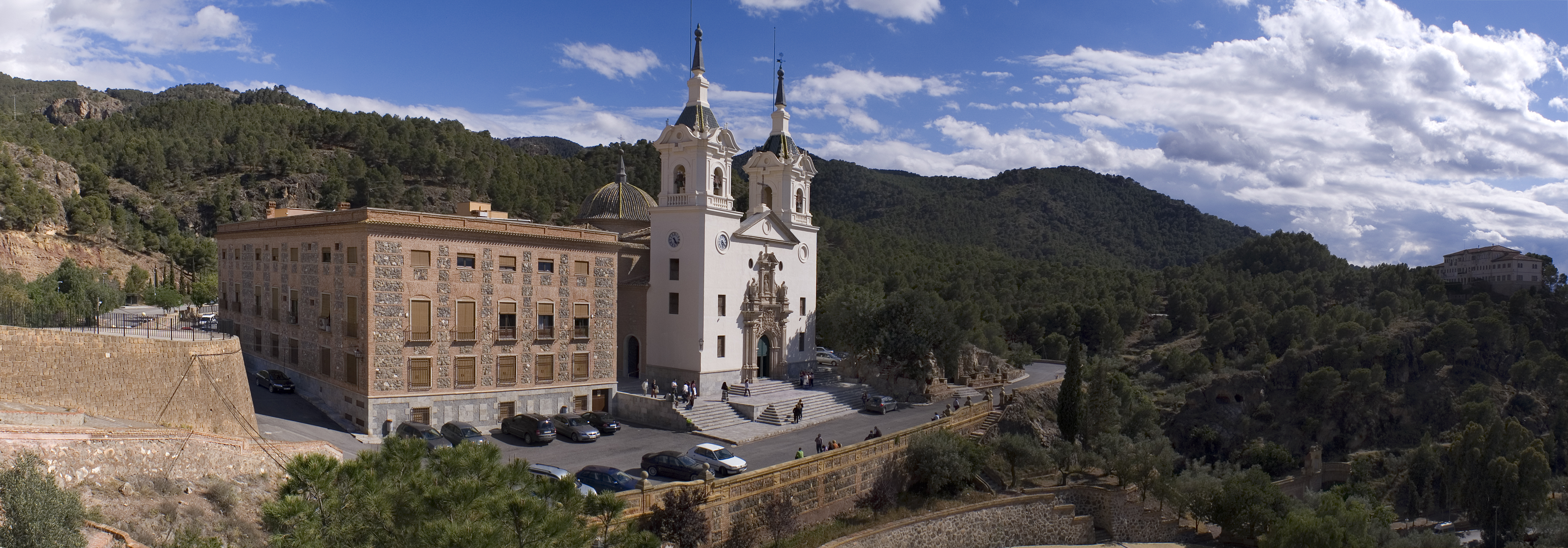 Santuario de la Fuensanta.